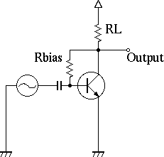 Self-bias circuit